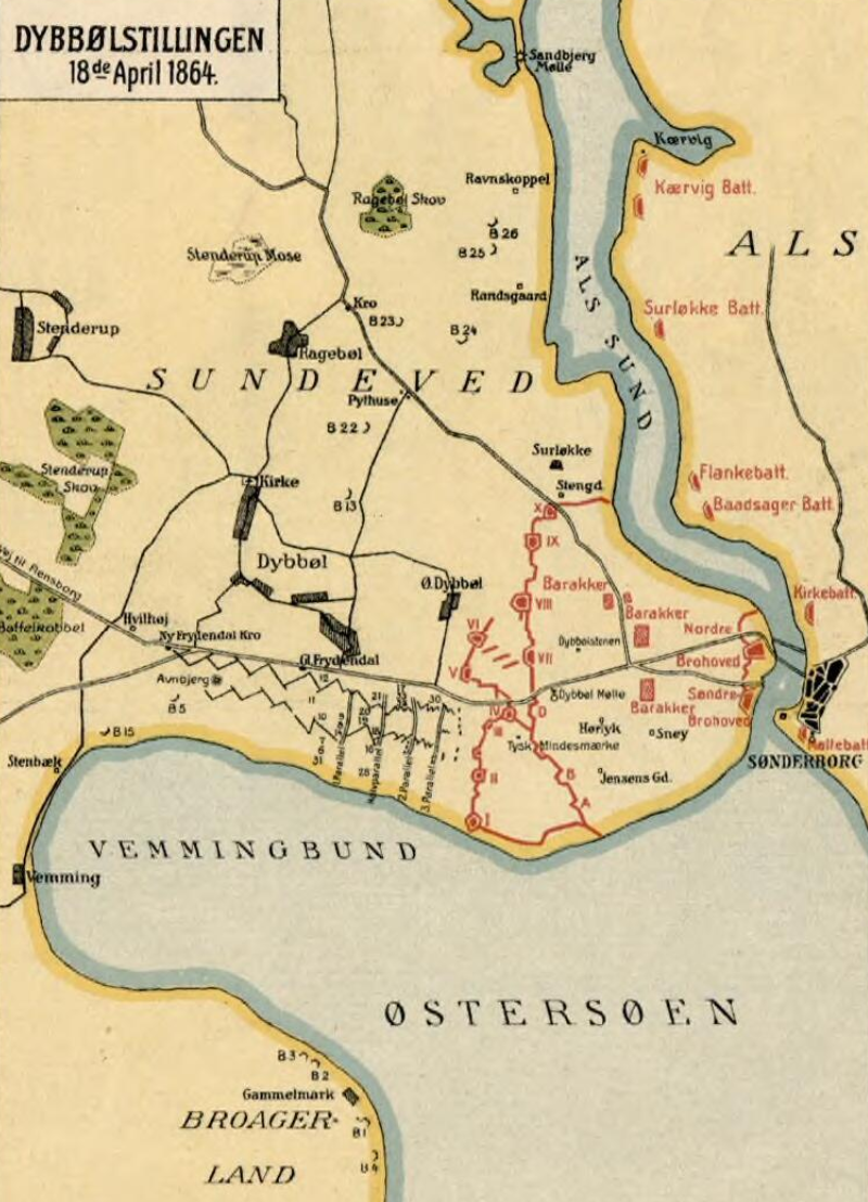 Dybbølstillingen 1864